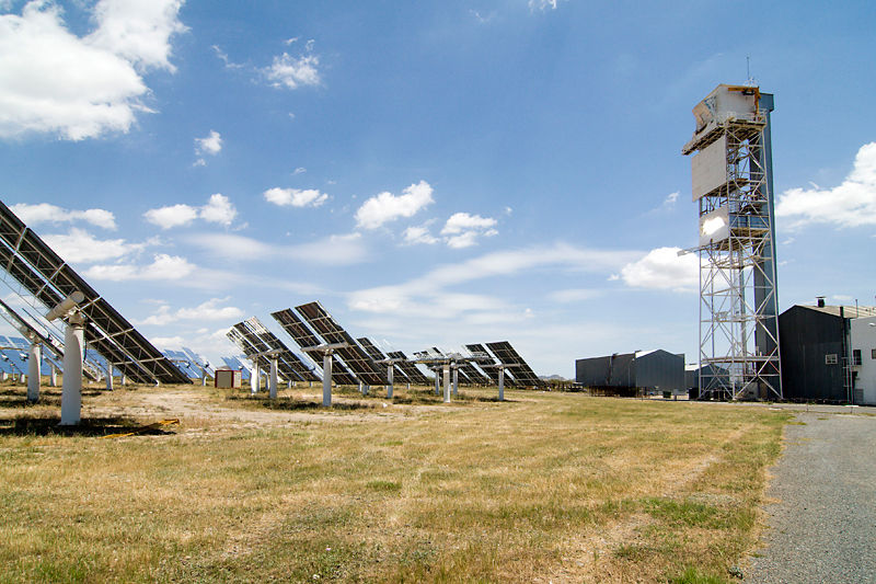 Vista del campo CRS con receptor Hydrosol II